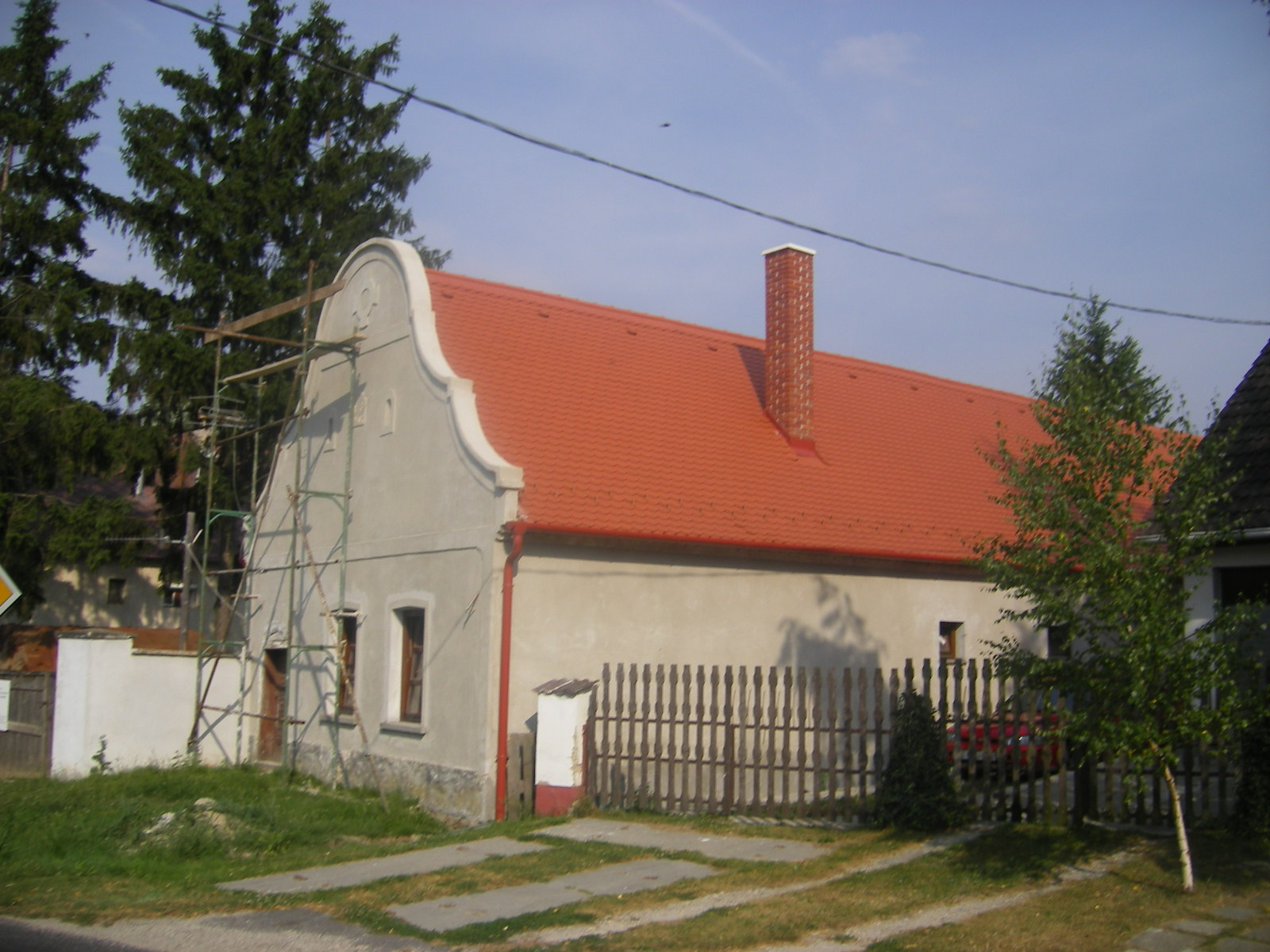 Bakonytamási - jellegzetes ház